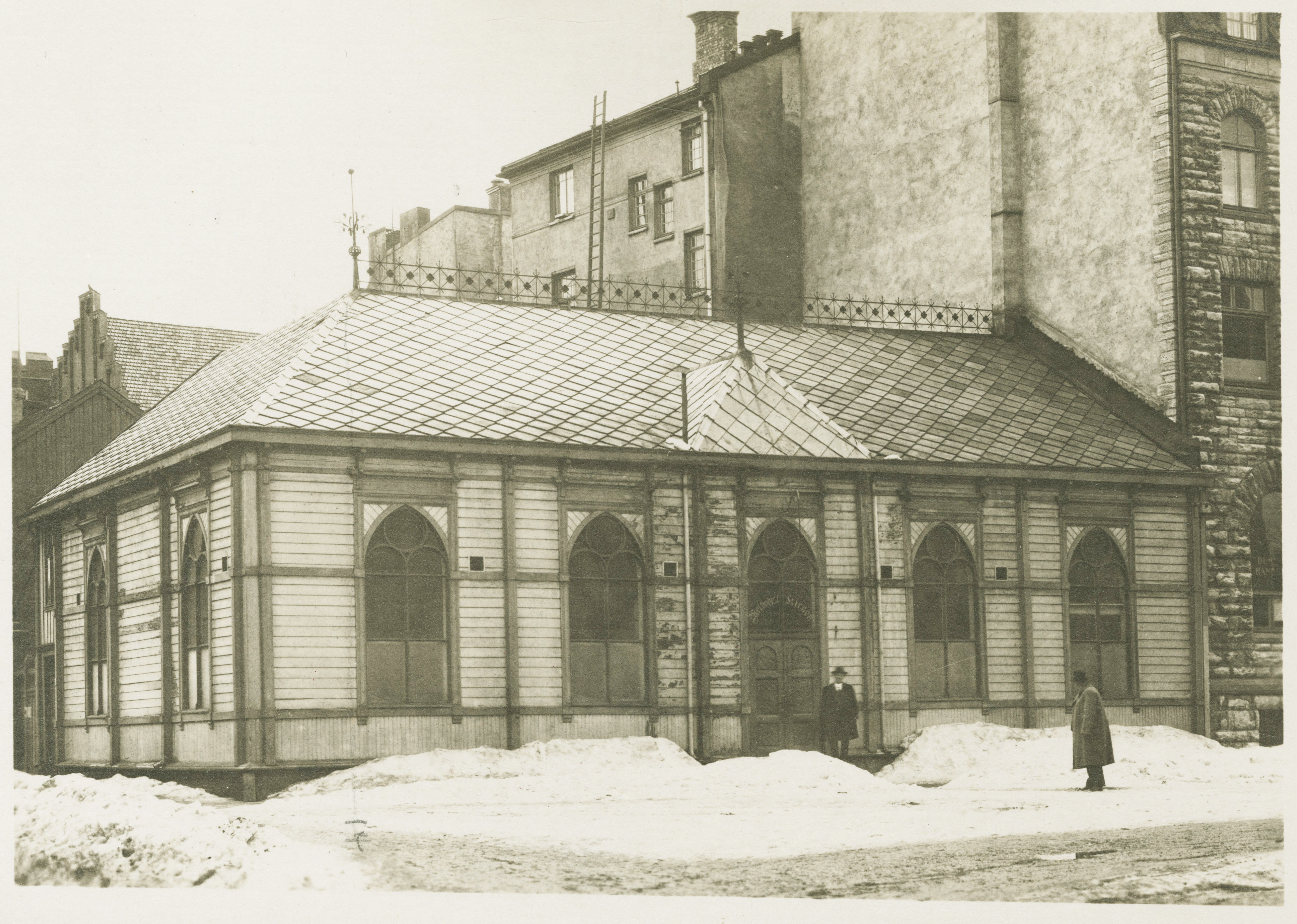 Eksteriør av den første metodistkirken, Lilletorget. Kirkebygg med kapell i tre innviet 1895. Høye buede vinduer. Skifertak. Kirken ble flyttet i 1924 for å gi plass til en ny og større kirke.